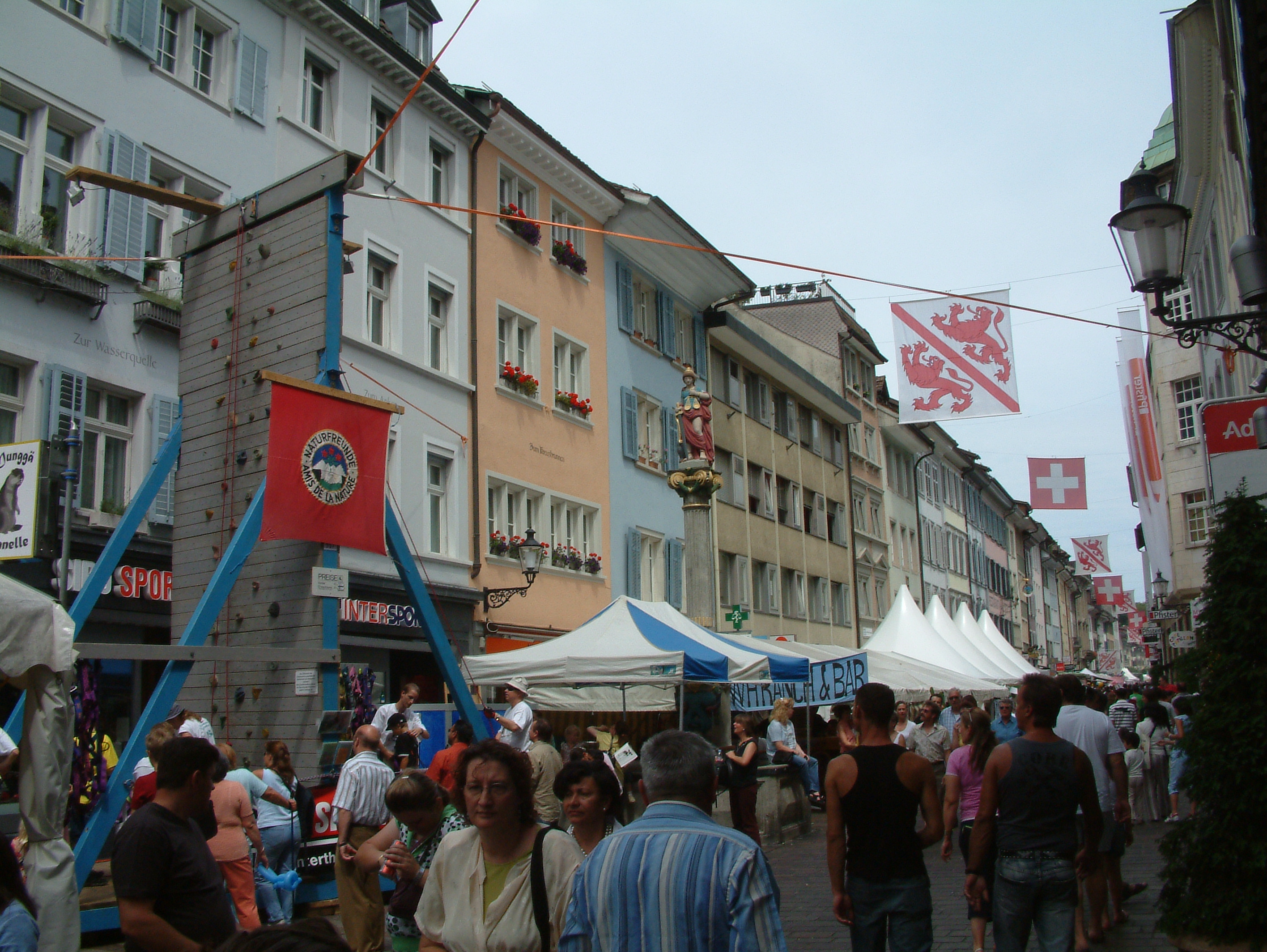 Marketstreet Switzerland Albani celebration Winterhur